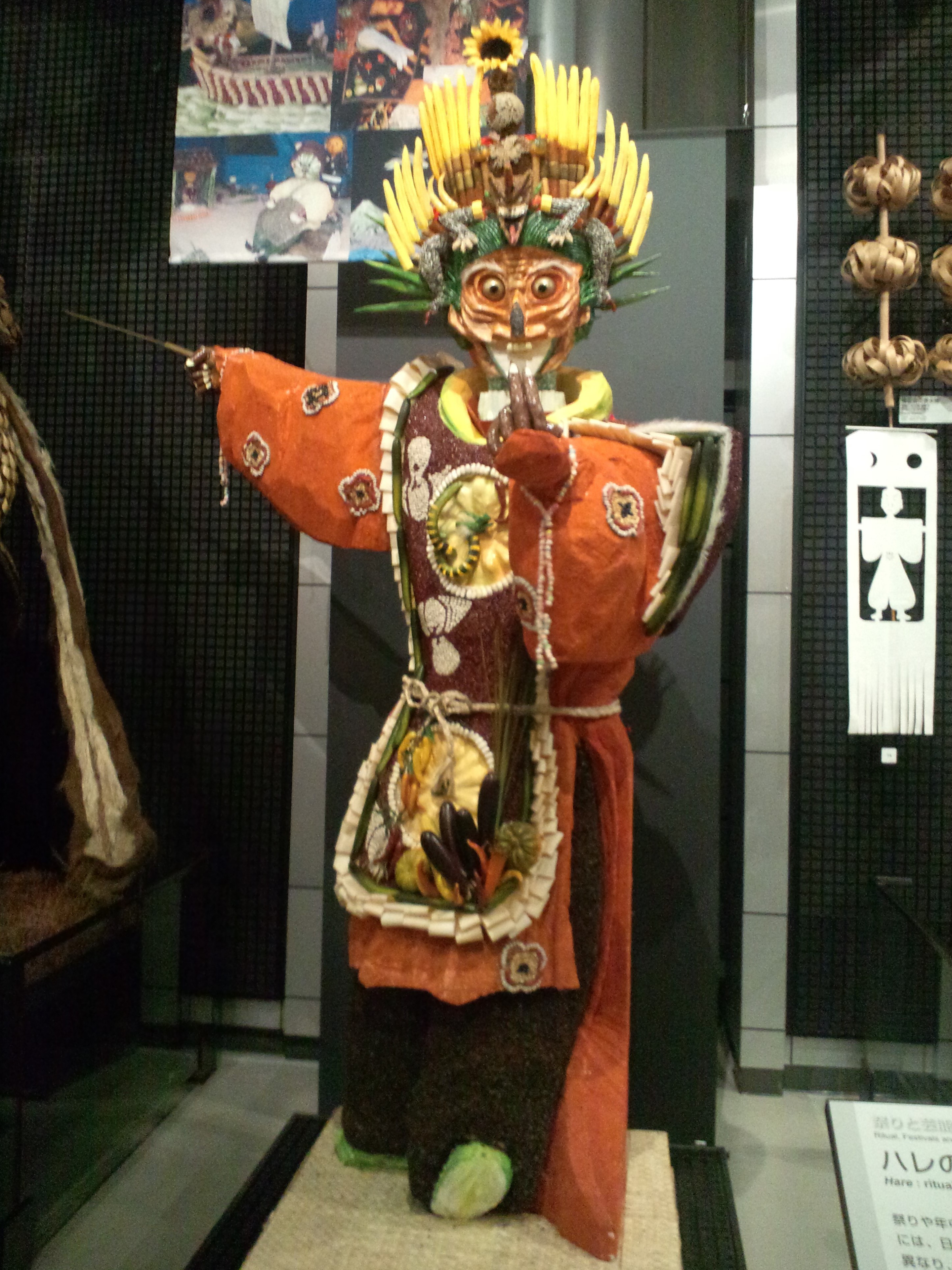 国立民族学博物館（大阪） つくりもんまつり野菜一式飾 蘭陵王「らんりょうおう」（富山県、高岡市、2012年収集）